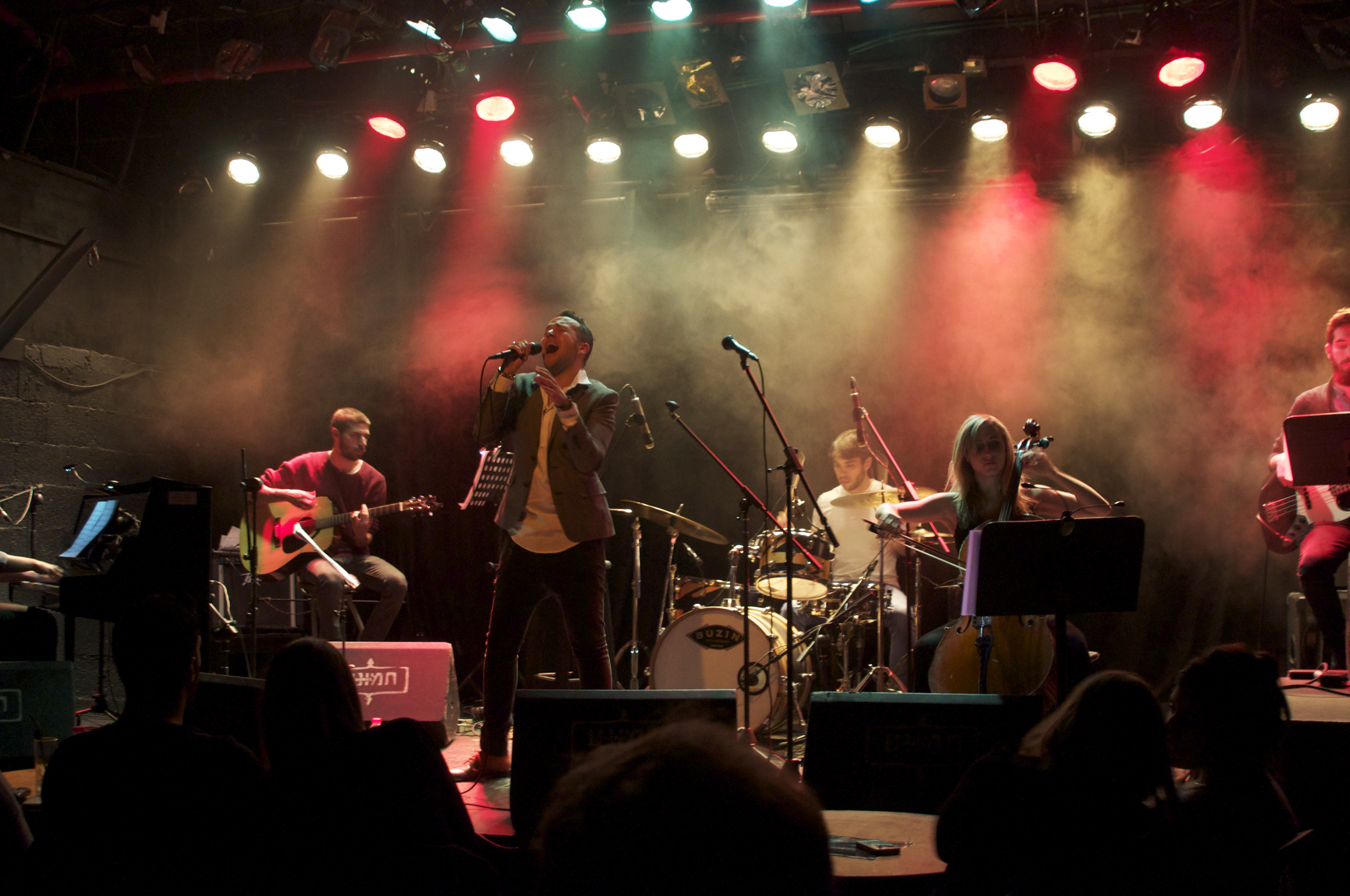 צילום: דביר גיחז